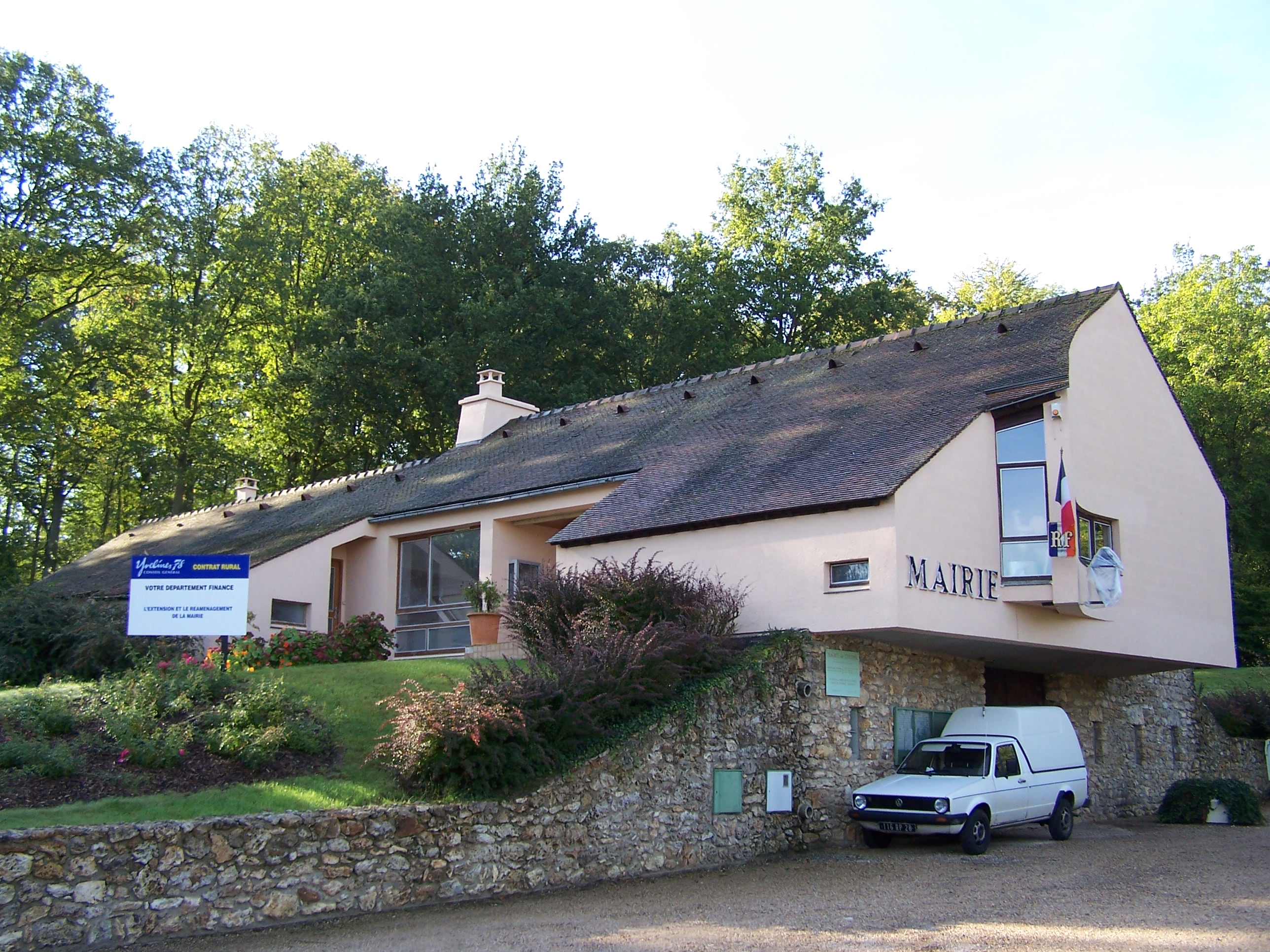 Mairie de Choisel (Yvelines, France)